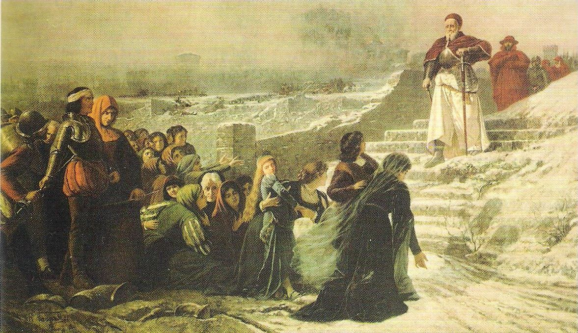 dipinto raffigurante la resa dei soldati di mirandola al Pontefice Giulio II Della Rovere